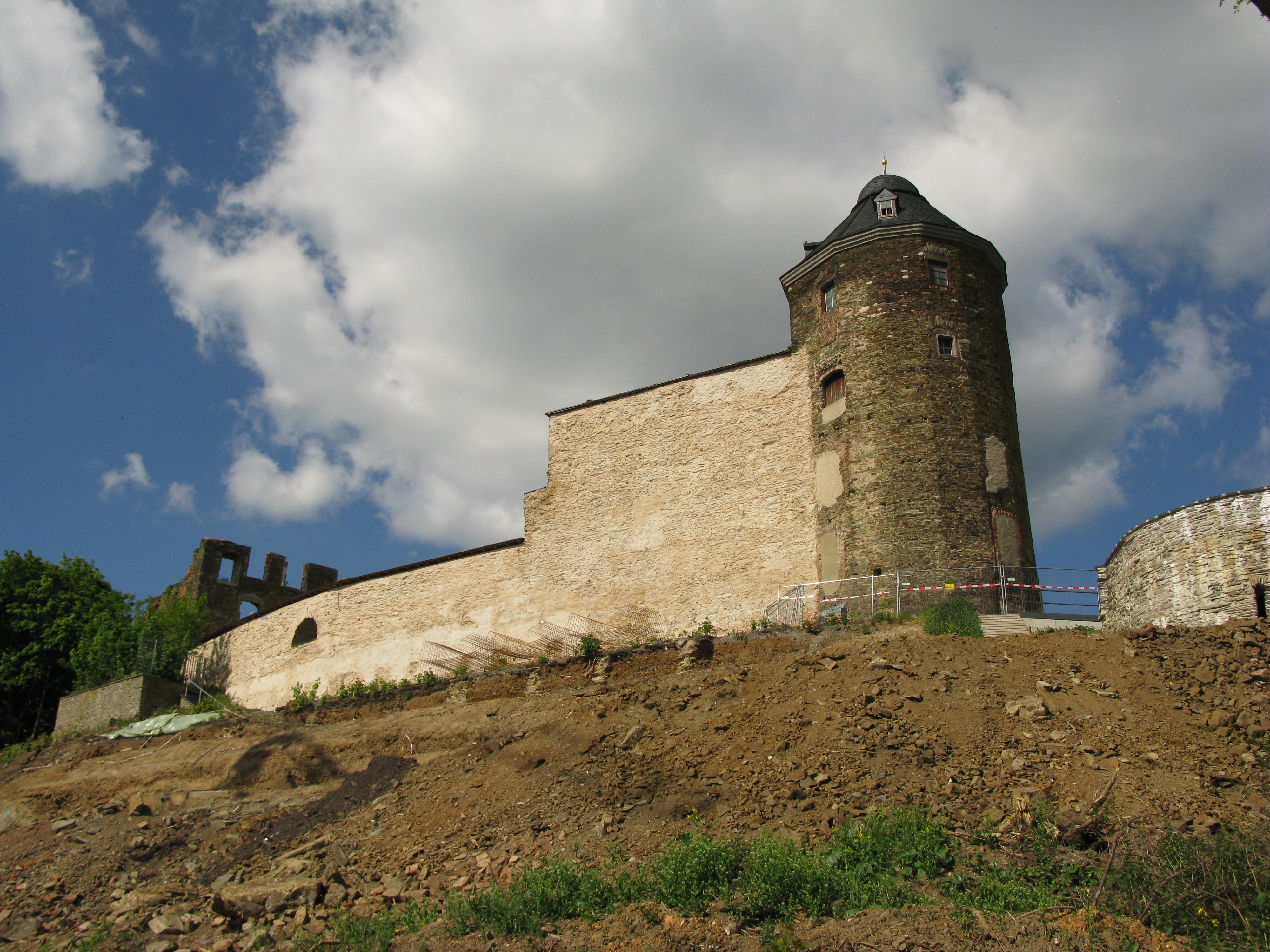 Schloss der Vögte in Plauen - Sechzehneckiger Turm und Mauer